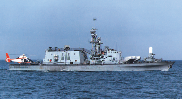 מסוק דולפין על ספינת חוחית 1985